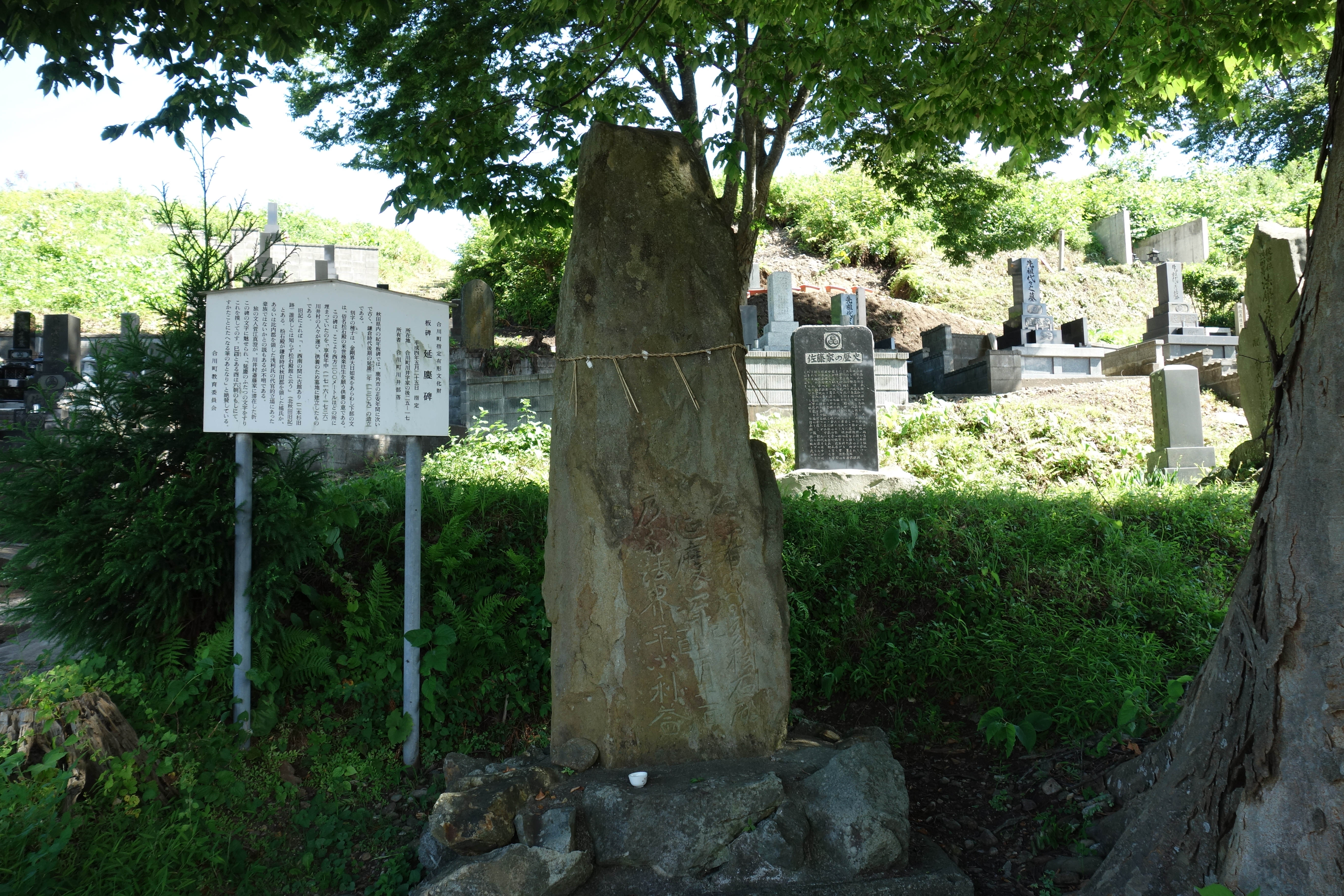 川井延慶碑（北秋田市川井字家の後55）